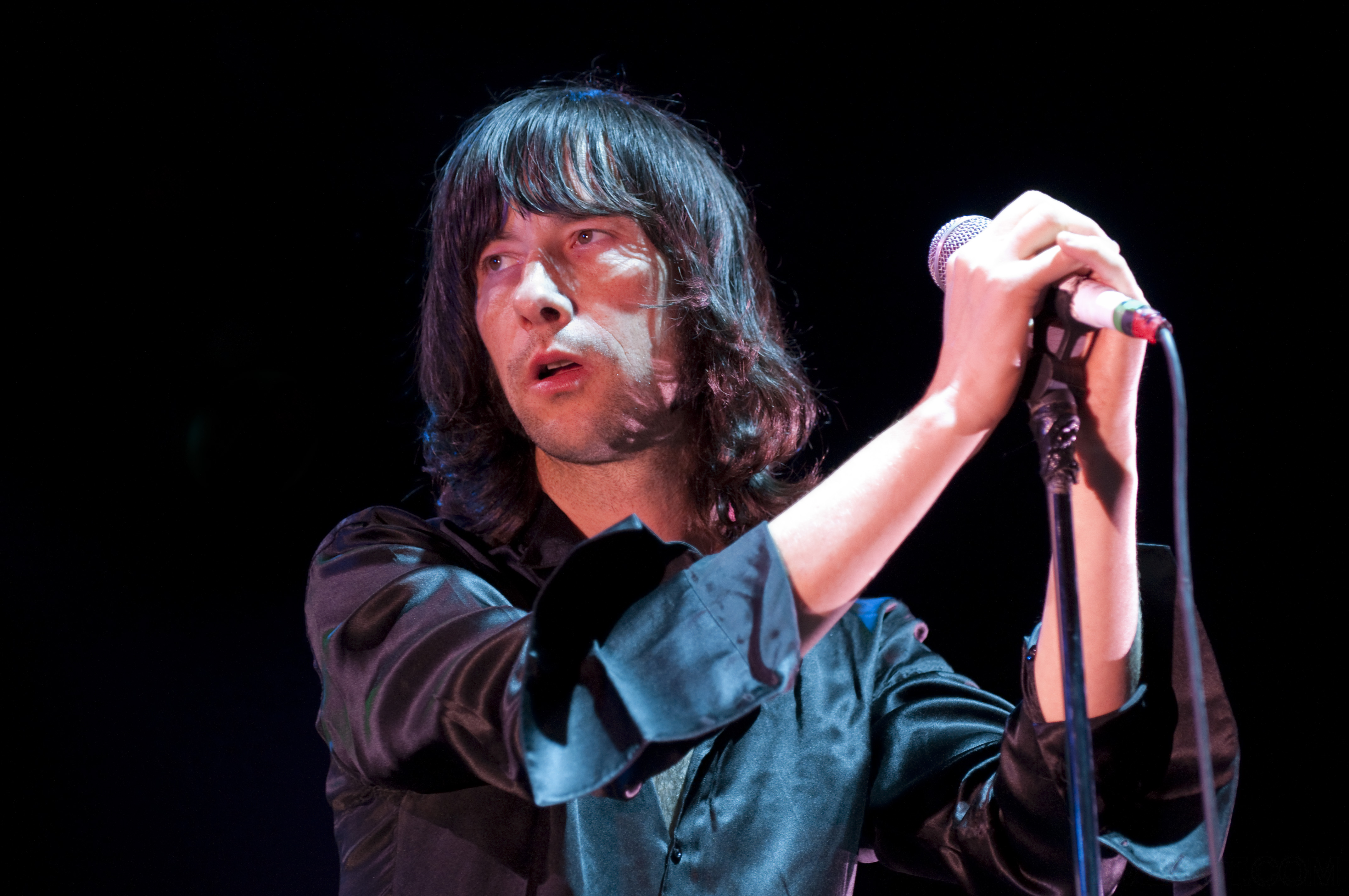 Primal Scream